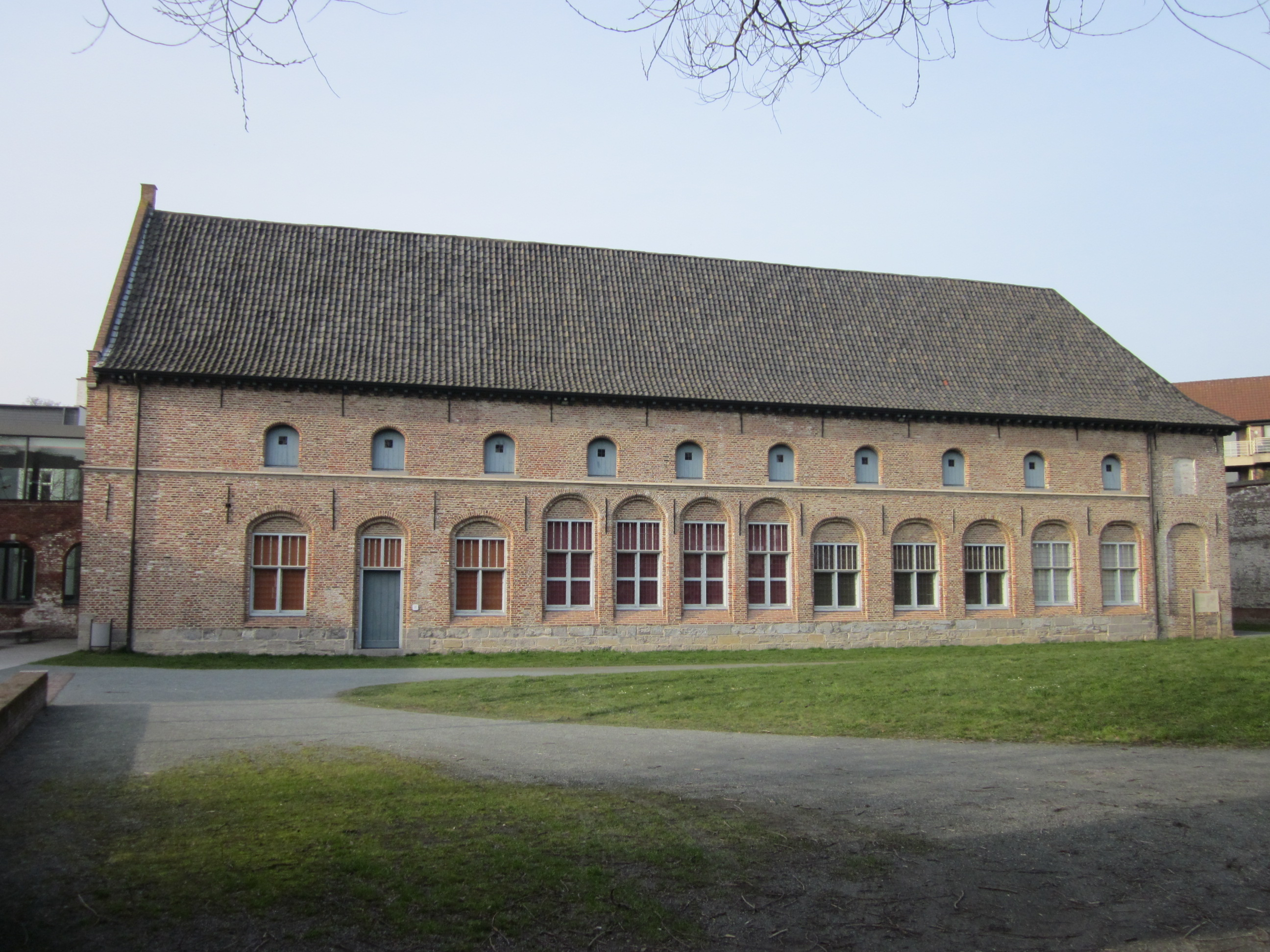 Groeningeabdij in Kortrijk waar tegenwoordig een museum is ondergebracht 96″ N, 3° 16′ 11.96″ E